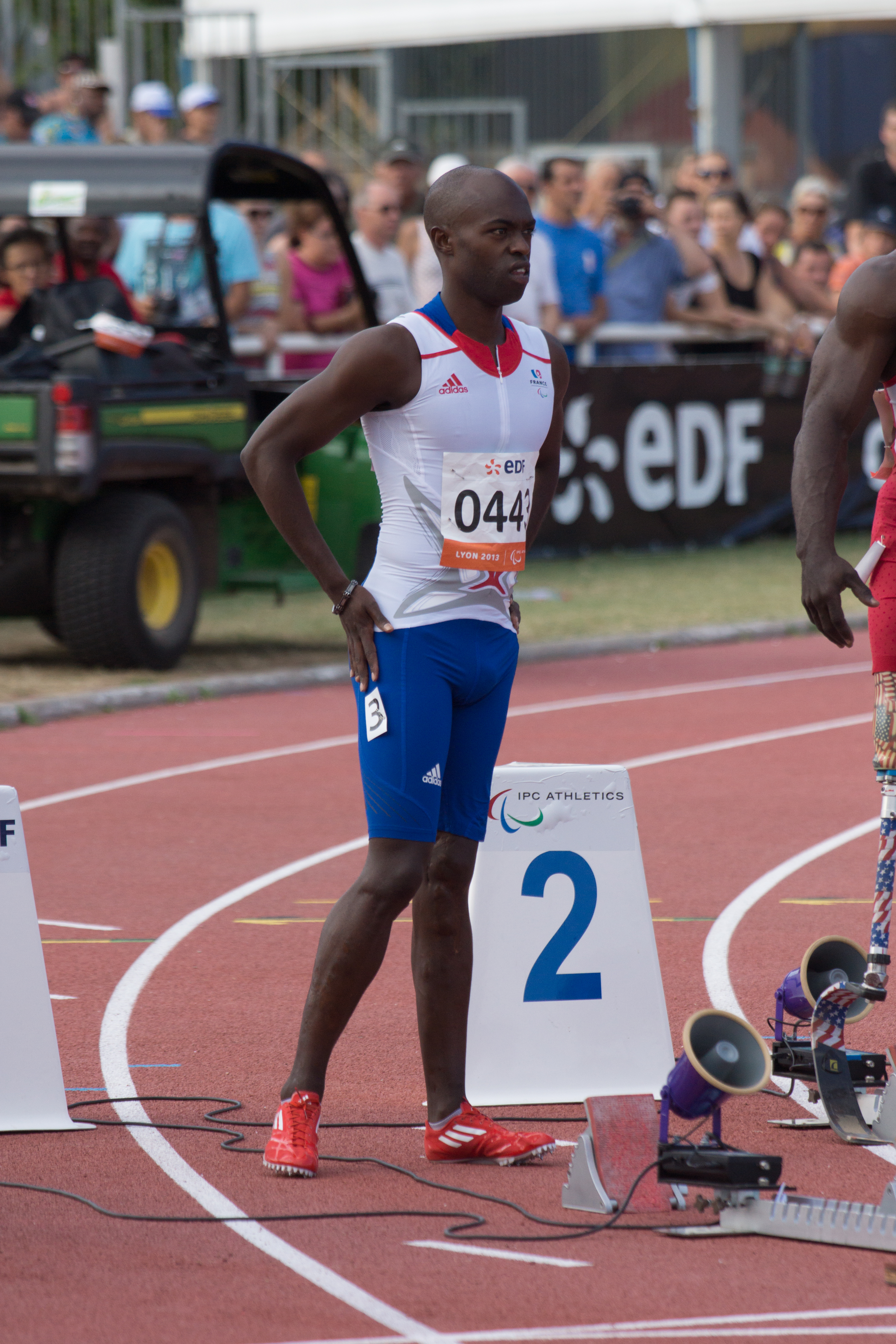 Championnats du monde d'athlétisme handisport 2013. 100 mètres masculin T42.